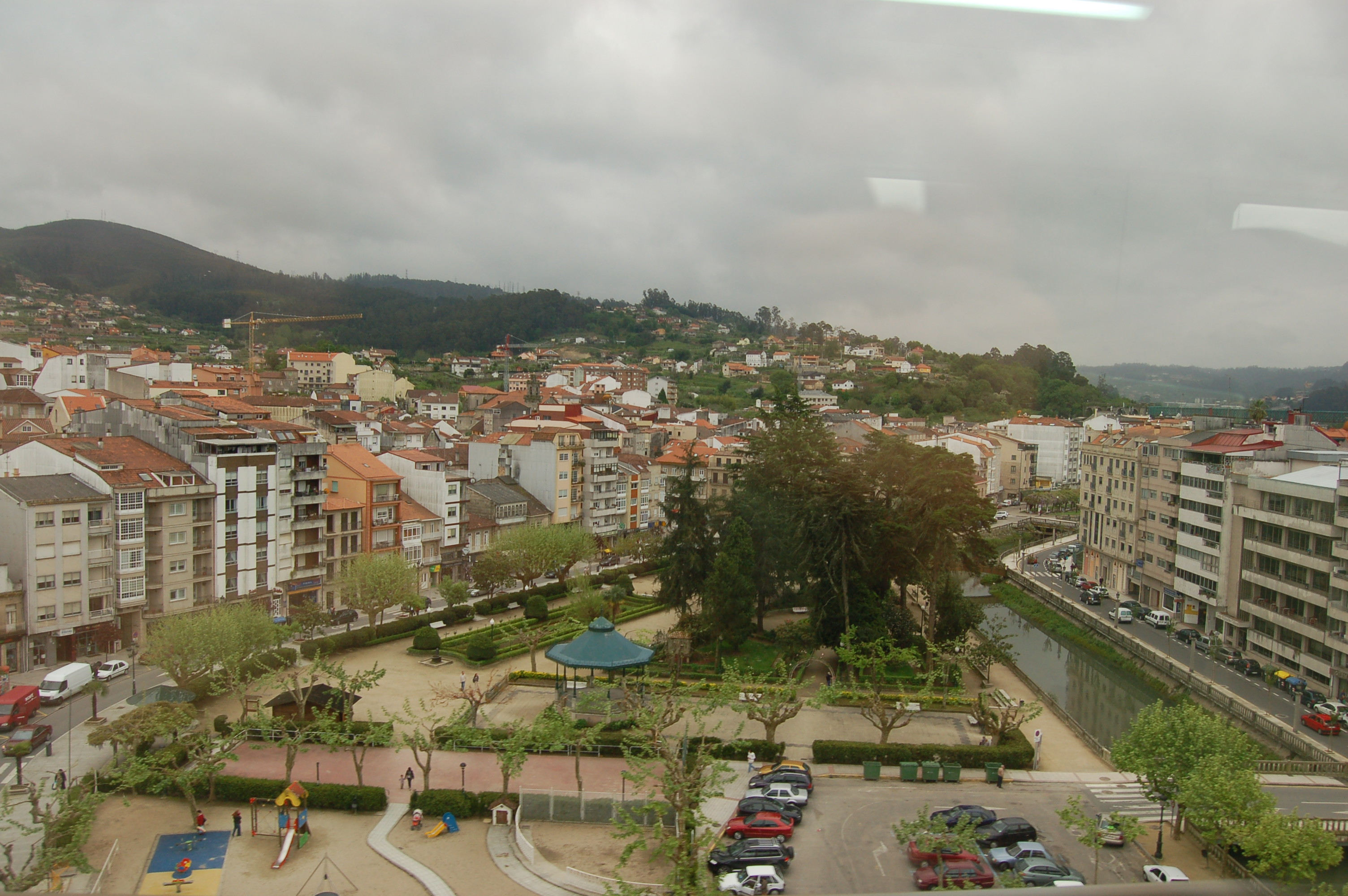 Vista xeral de Redondela desde o viaduto do tren (Viaduto de Pontevedra). Categoría:Imaxes de Redondela